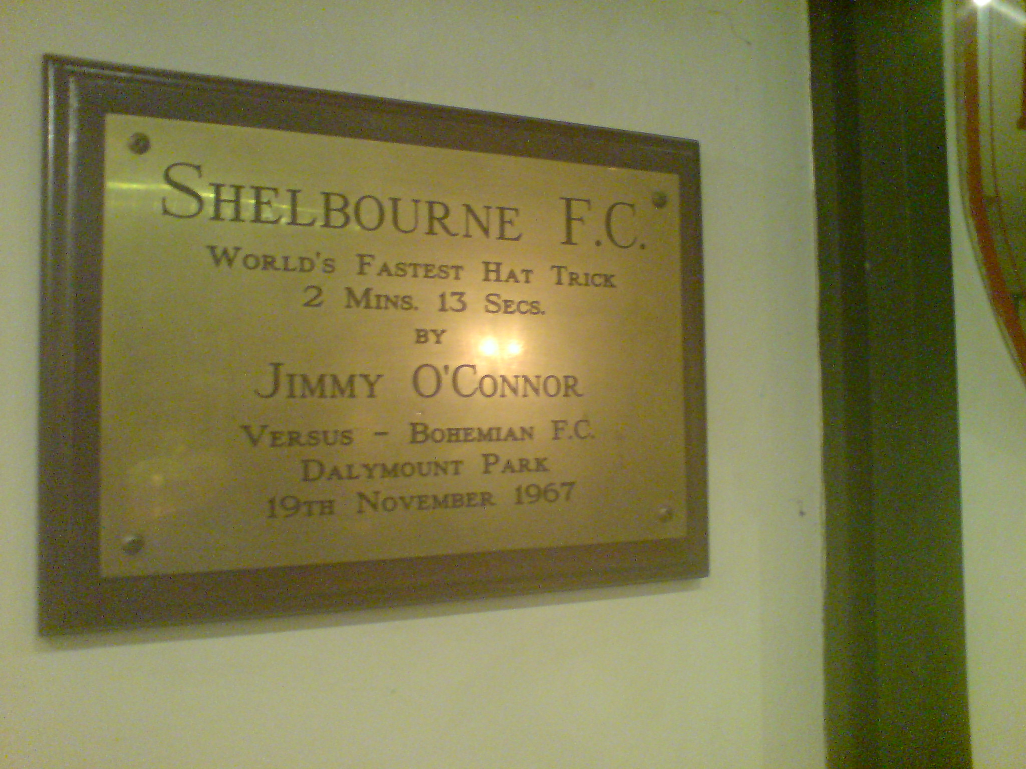 plaque commémorative du hattrick le plus rapide au monde